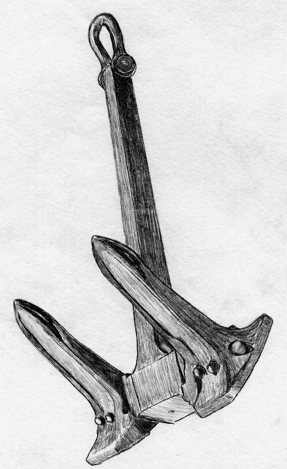 Якорь Смита, рисунок.